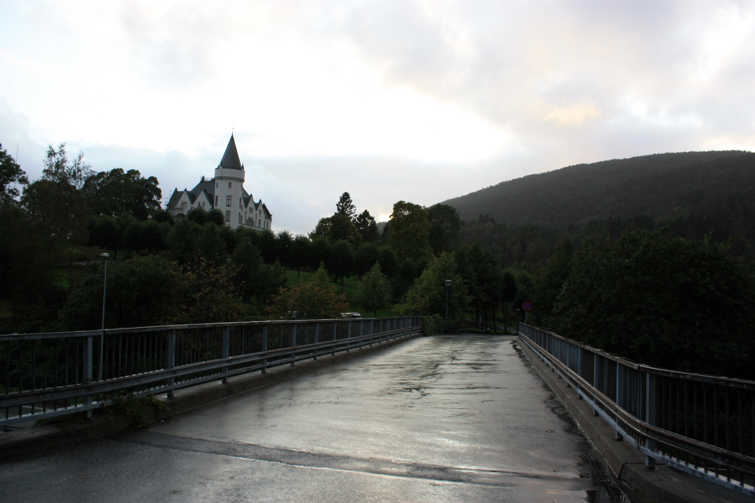 Gamlehaugvegen, Fana, Bergen.